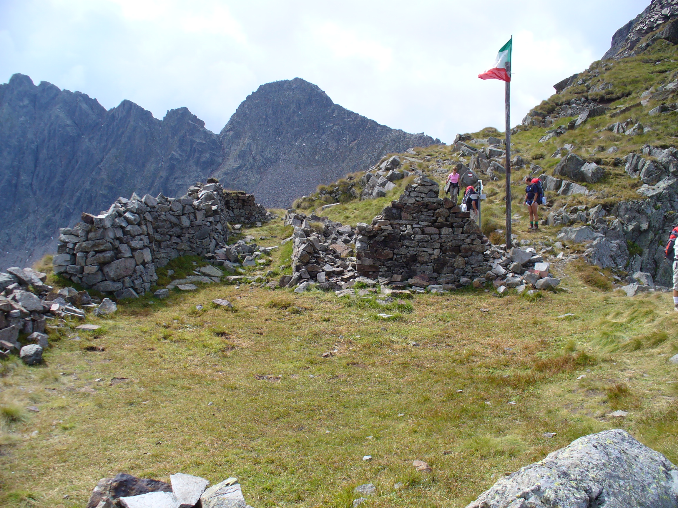 Il Passo di Campo prima della discesa dell'Ignaga